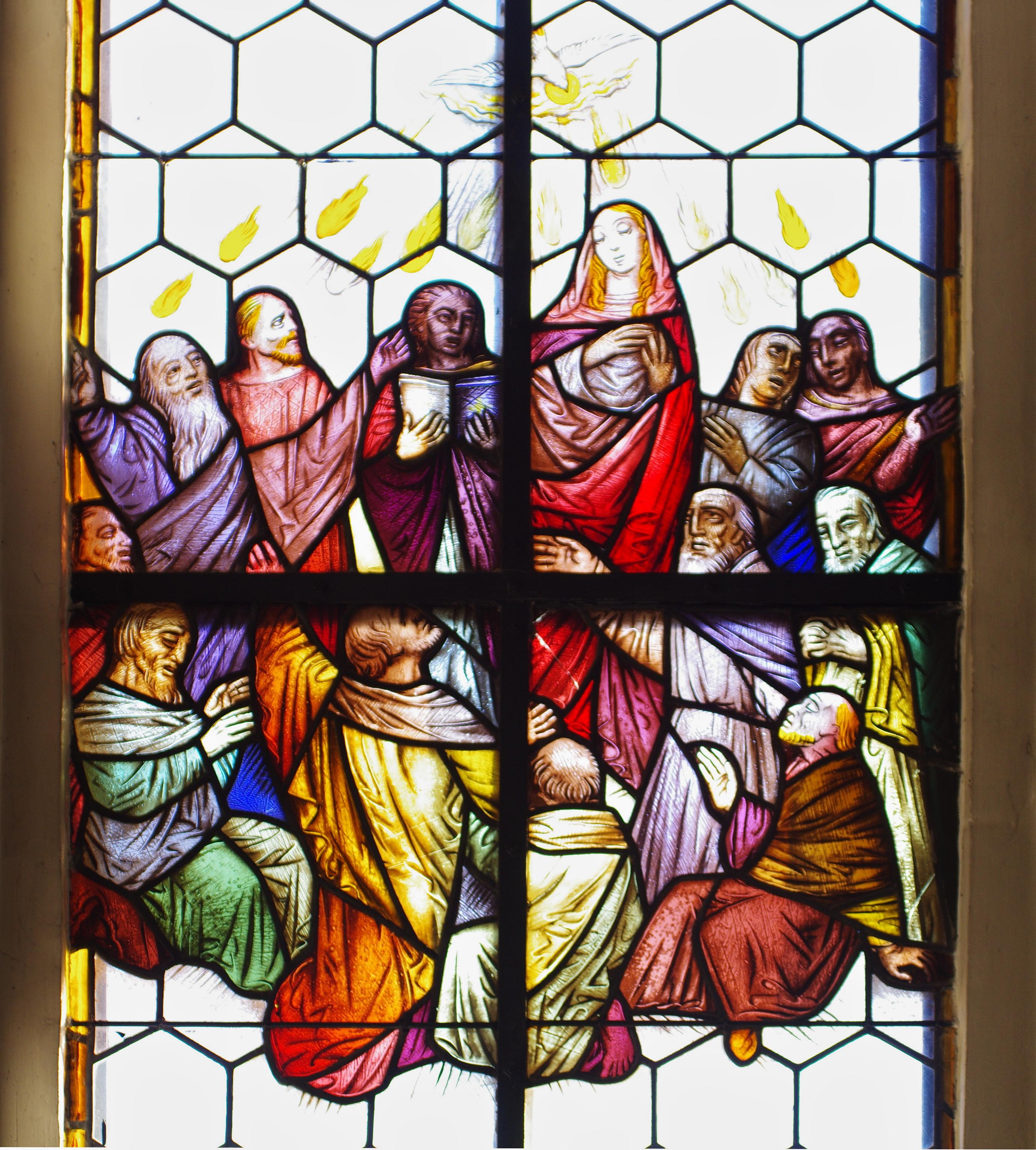 Fenster auf der Südseite